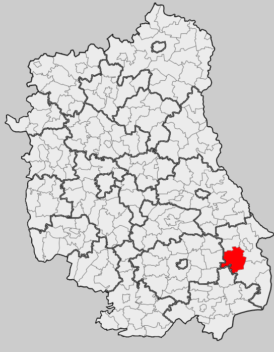 Map of gmina Werbkowice, Hrubieszów county, Lublin voivodship Mapa gminy Werbkowice, powiat hrubieszowski, województwo lubelskie